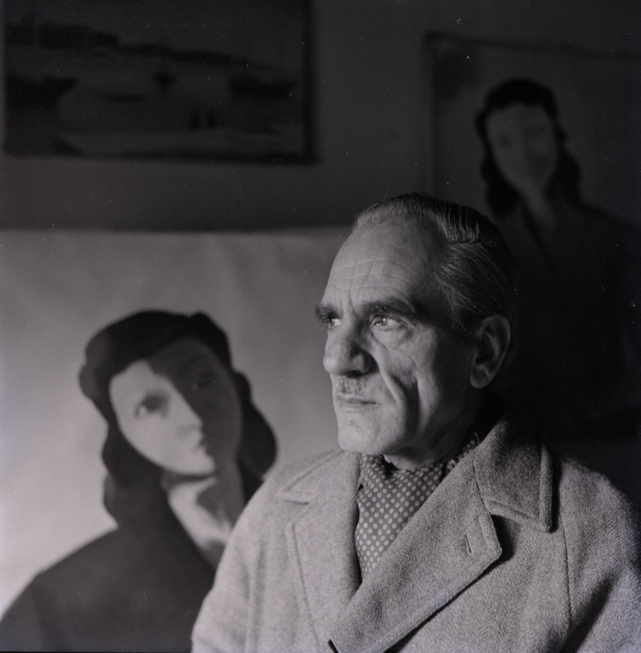 Servizio fotografico : Italia, 1982 / Paolo Monti. - Buste: 7, Fototipi: 7 : Negativo b/n, gelatina bromuro d'argento/ pellicola ; 6x6. - ((Serie costituita da 7 buste di carta, tenute insieme da una graffetta, identificate con la numerazione: R4353, R4354, R4355, R4356, R4357, R4358, R4359 . - Sulla busta R4353: "Guidii". - Fonte: Rubrica di Paolo Monti: Archivio 10x12 (ultimi numerati) - dal G1 al (s.d.), presso Archivio Paolo Monti